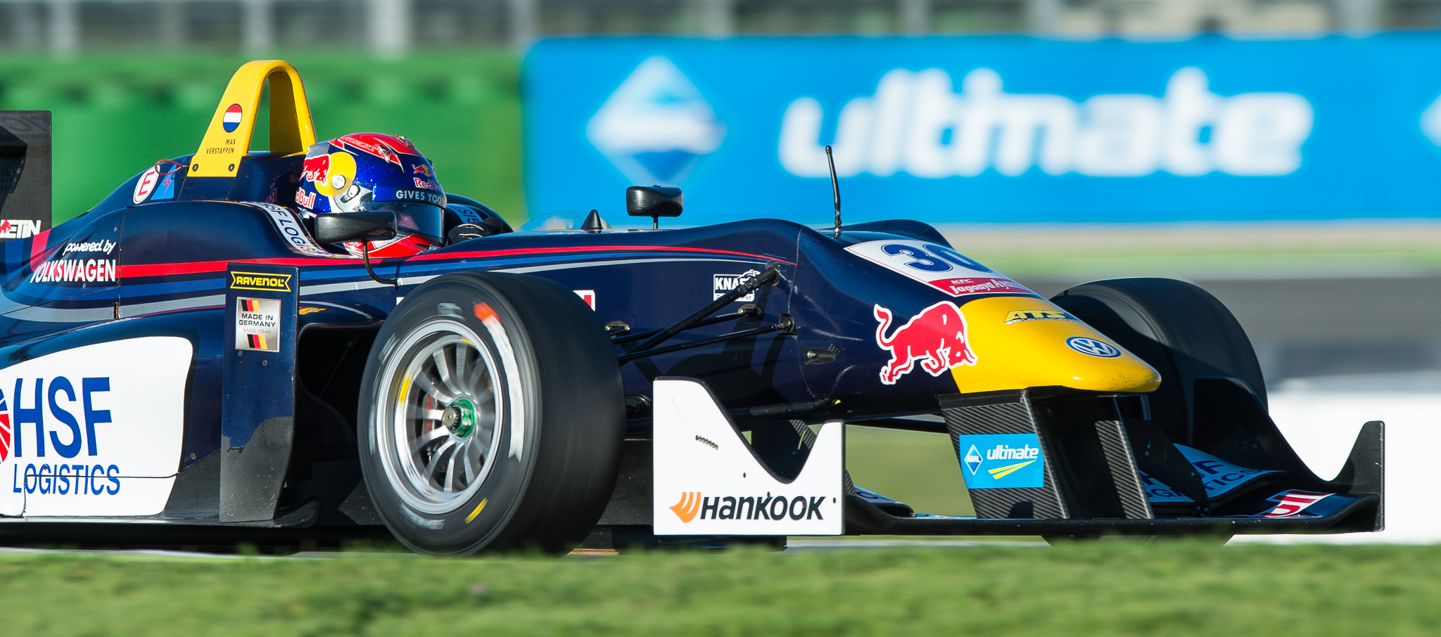 DTM,Dallara F312,Deutsche Tourenwagen Masters,F3 FIA European Championship,FIA Formel 3 Europameisterschaft,Hockenheimring,Max Verstappen,Motorsport,Van Amersfoort Racing,Volkswagen